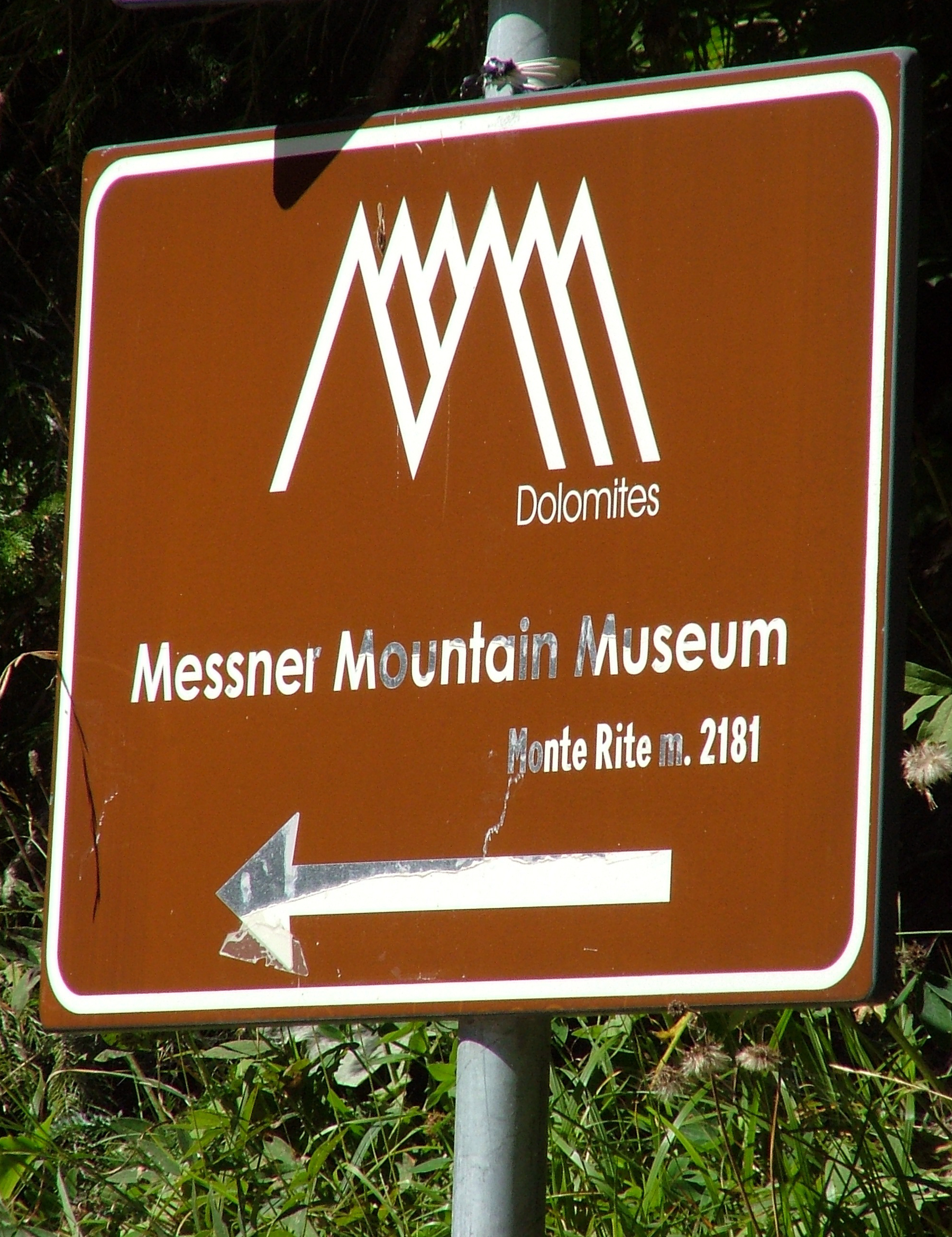 Foto del cartello del Messner Mountain Museum di Cibiana del Cadore (BL)